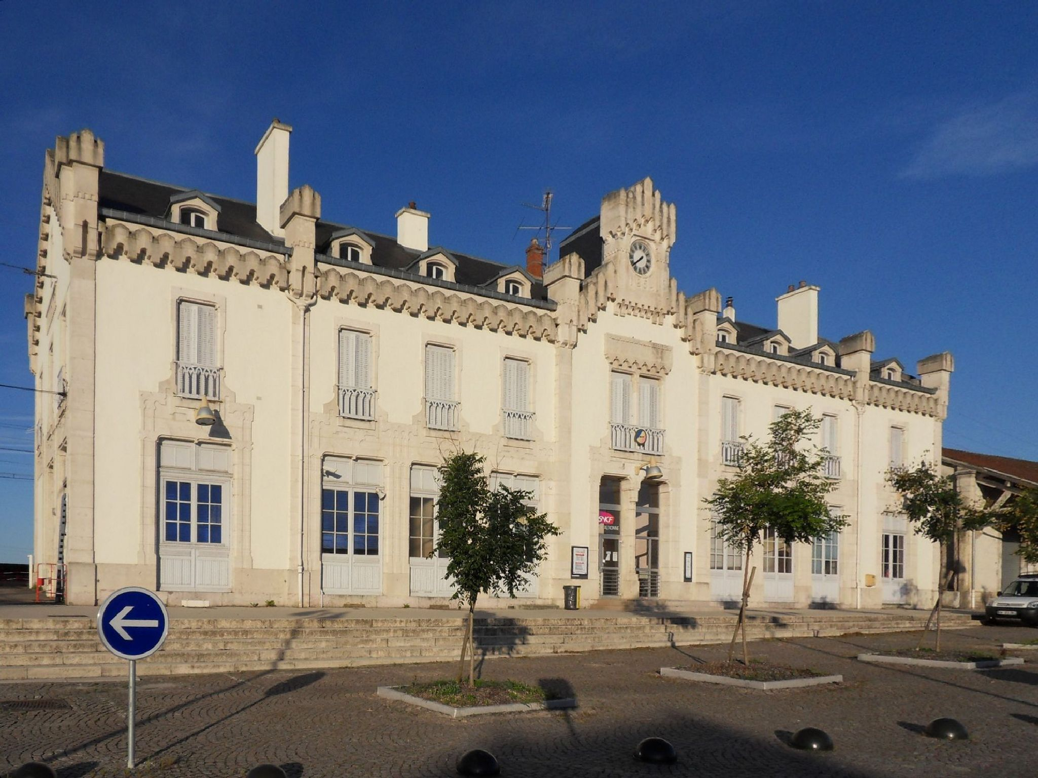 Gare d'Auxonne. Le bâtiment voyageurs et la cour voyageurs depuis la création pôle d'échanges multimodal